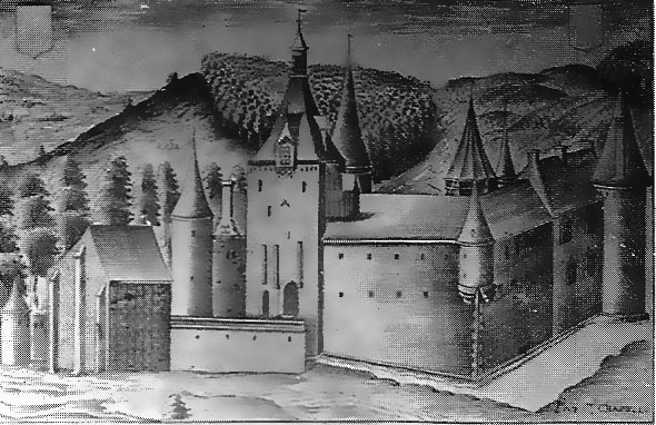 Le château d'Etoges vers 1600